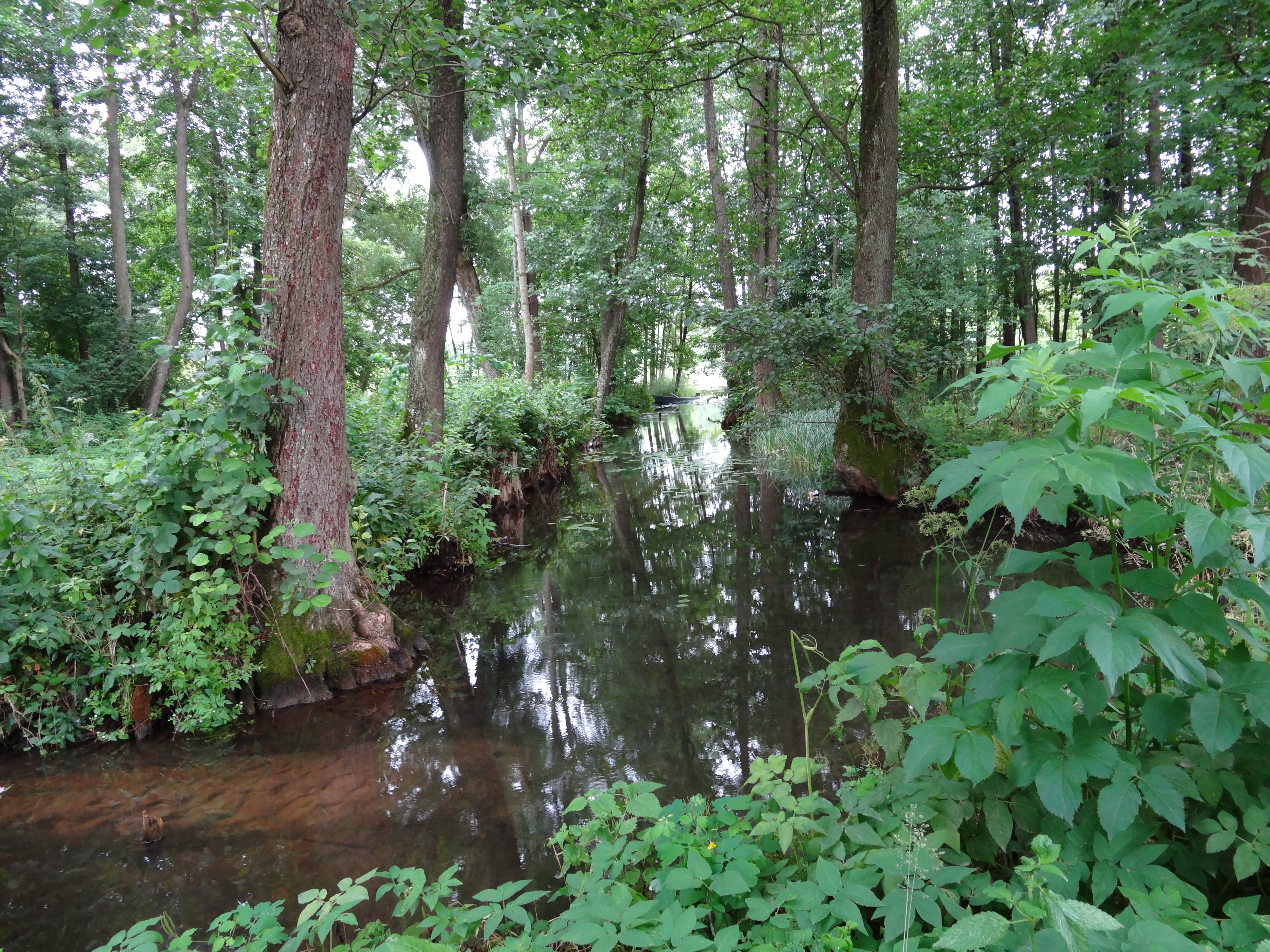 Ścieżka wokół jeziora Jaczno, przy ruinach młyna Jaczne...